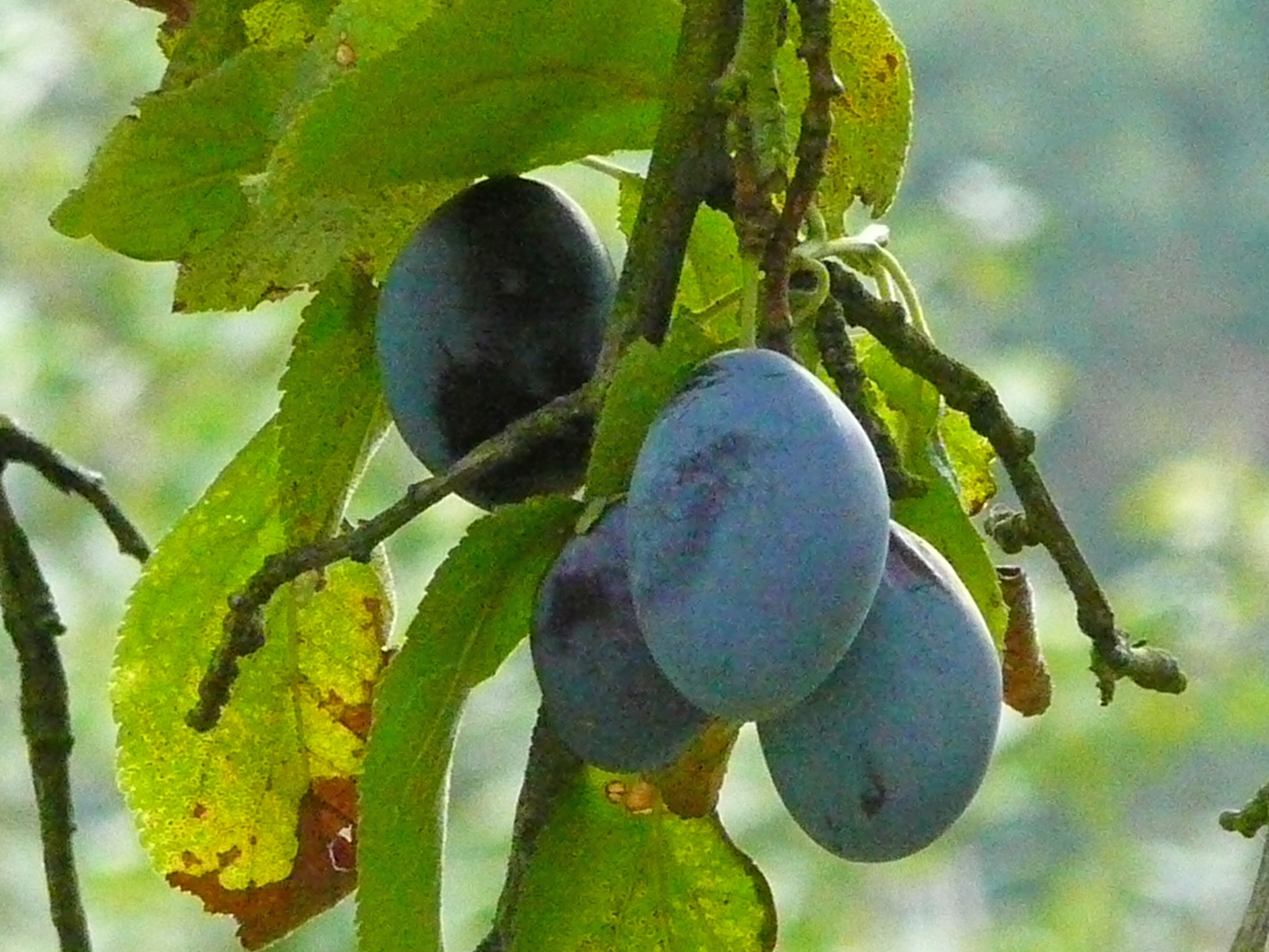 Reife Zwetschgen am Baum (Prunus domestica)